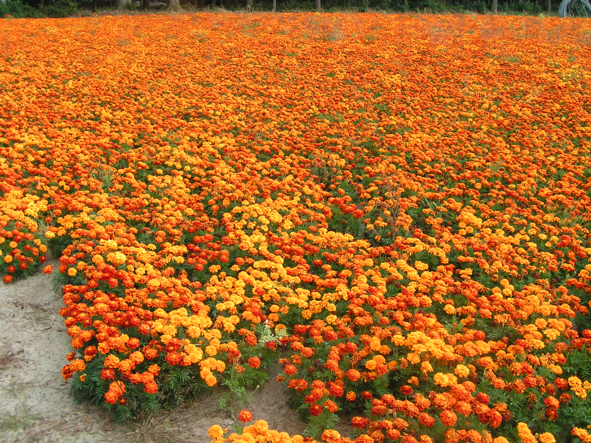 Tagetesfeld an der B72 in Varrelbusch (Gemeinde Garrel im Landkreis Cloppenburg, Niedersachsen)